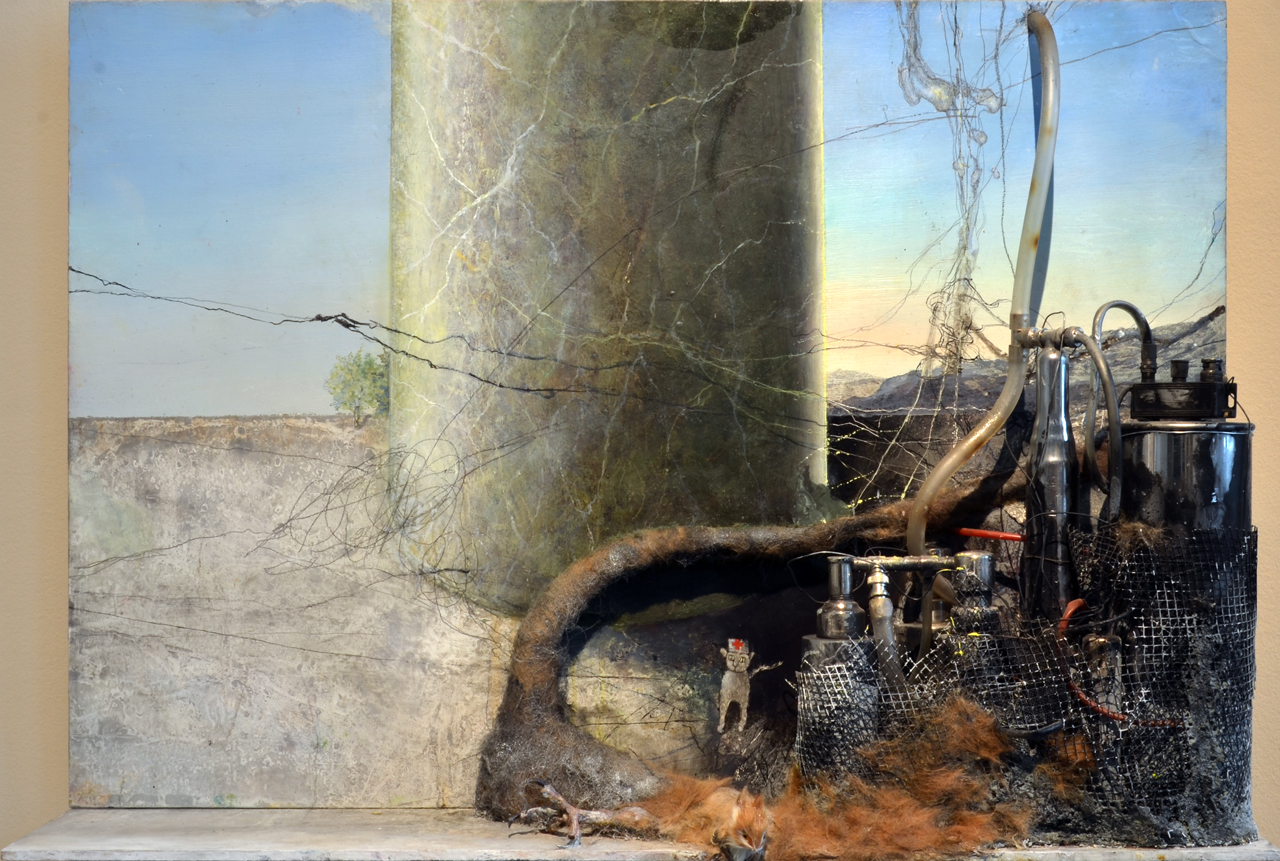 Bedřich Dlouhý, Sestřička (2012), kombinovaná technika